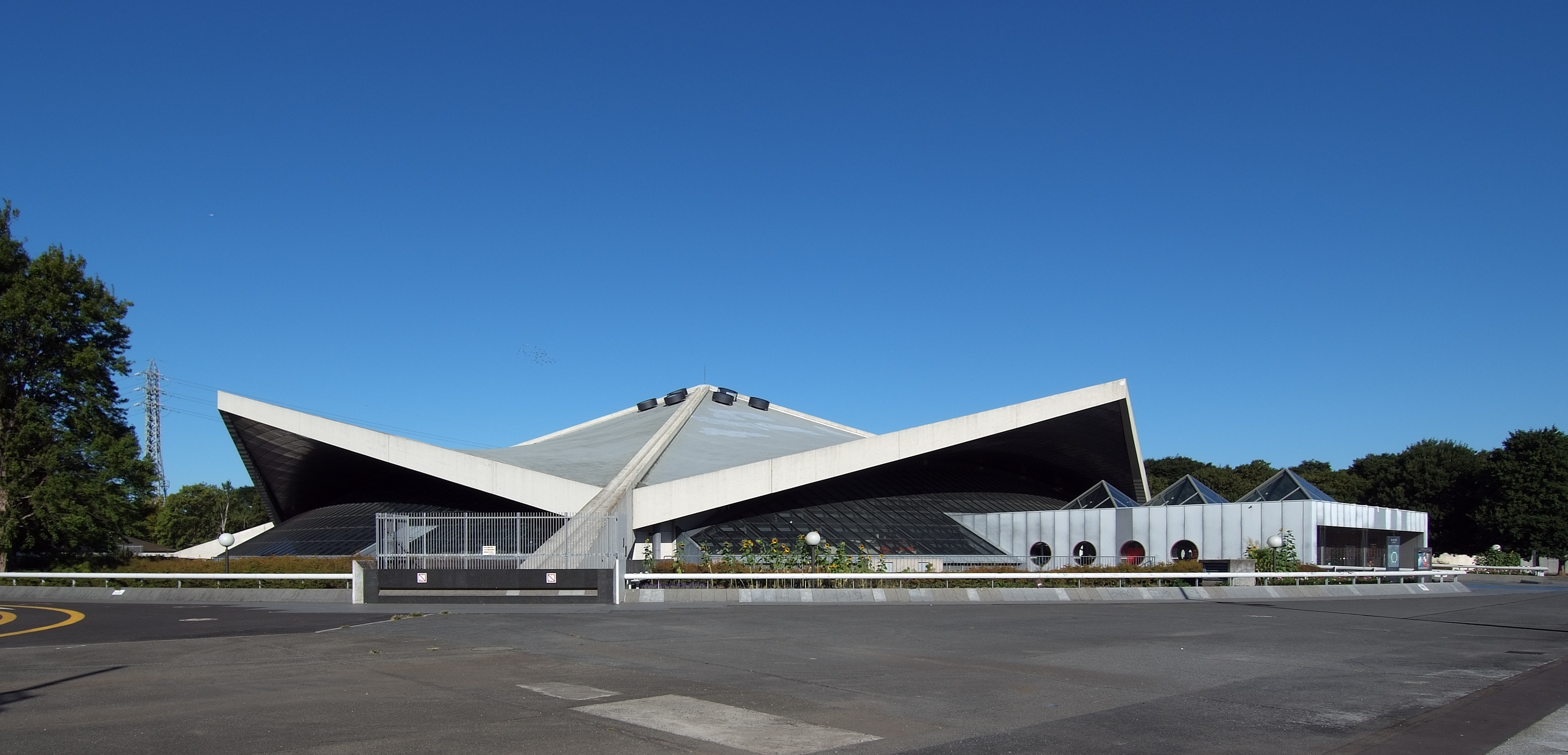 Komazawa Gymnasium, at Setagaya-ku Tokyo Japan, design by Yoshinobu Ashihara in 1964.